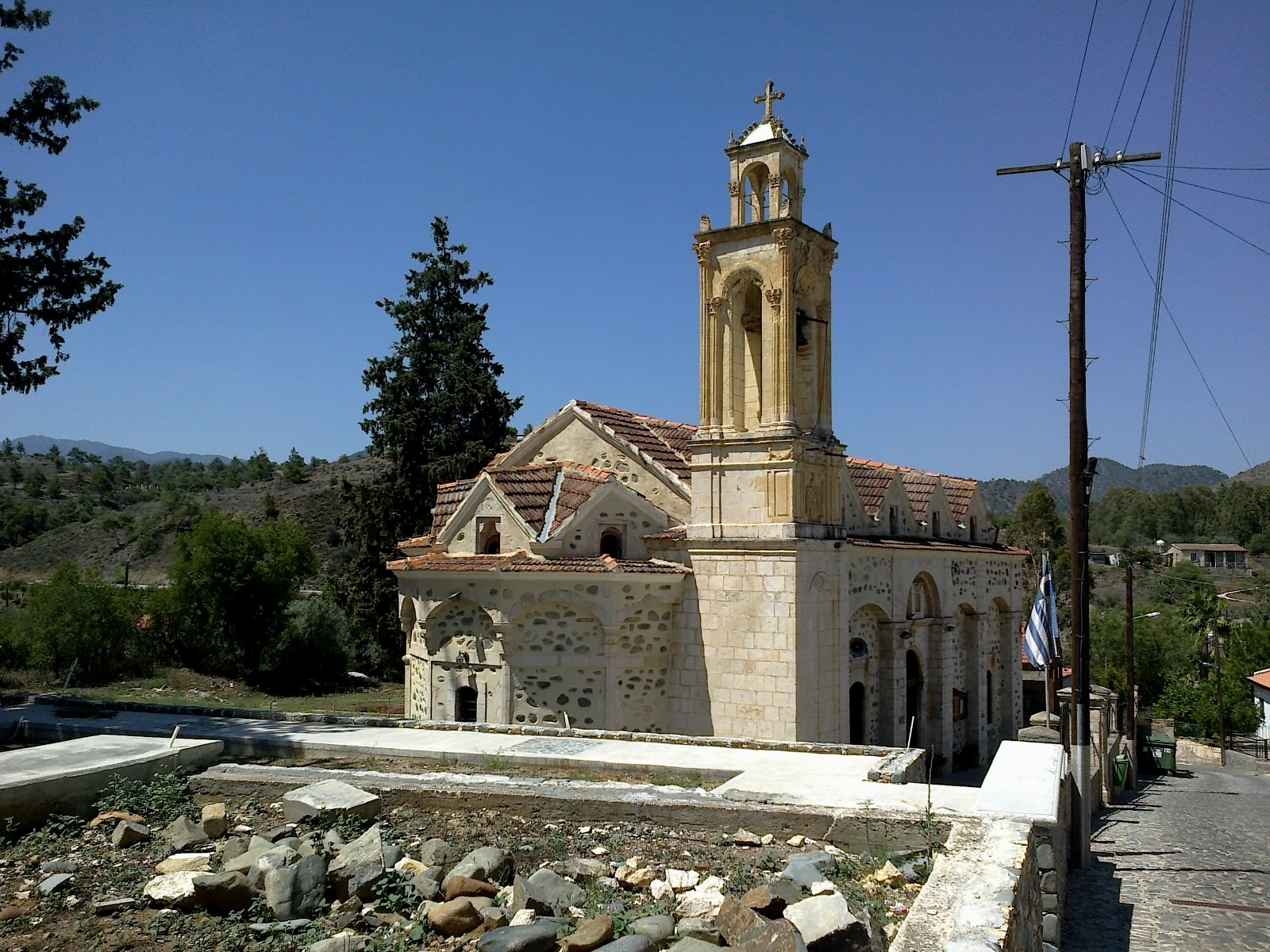 Chypre Vysakia Eglise 16062014